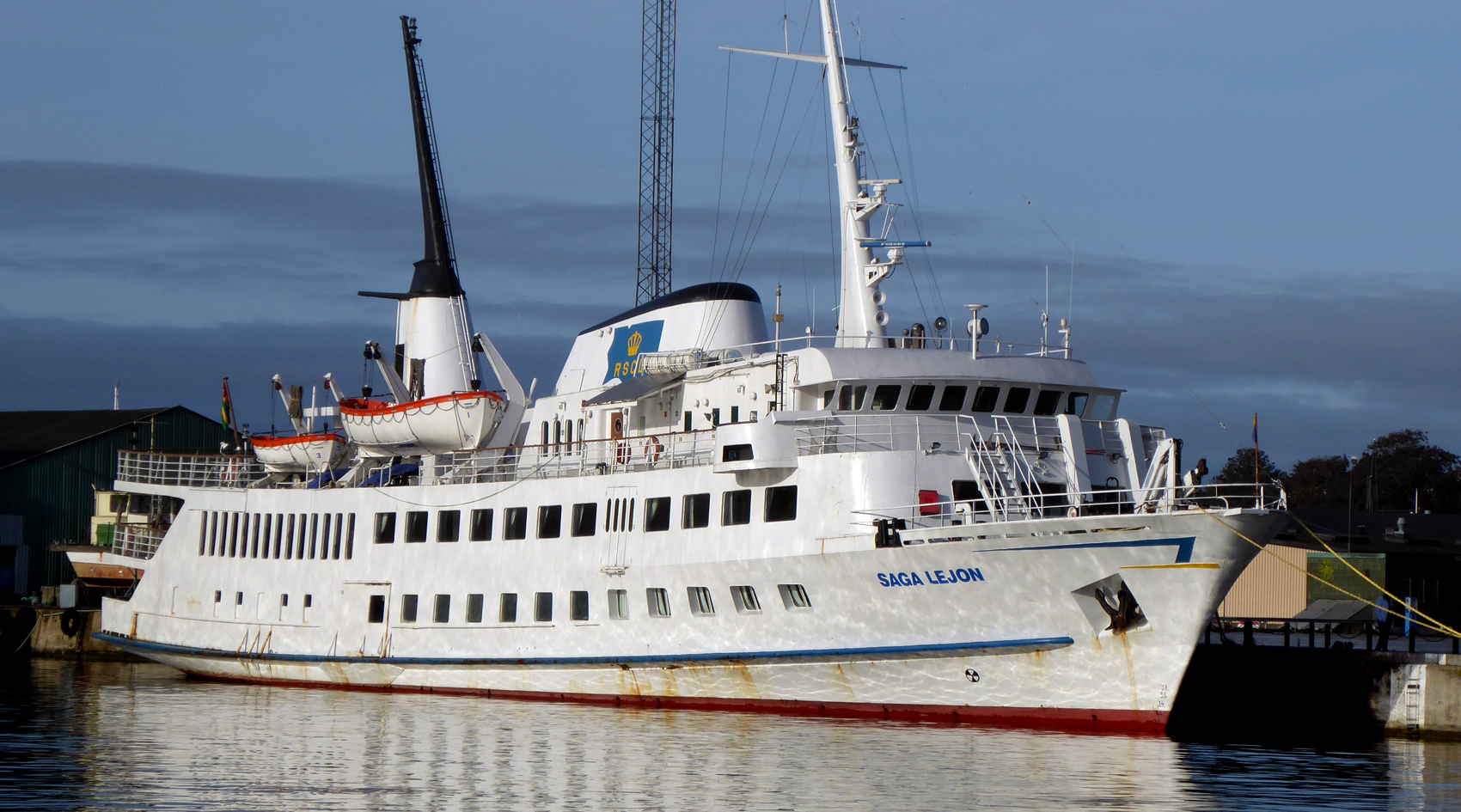 M/S Saga Lejon i Ystads hamn 15 okt 2017.